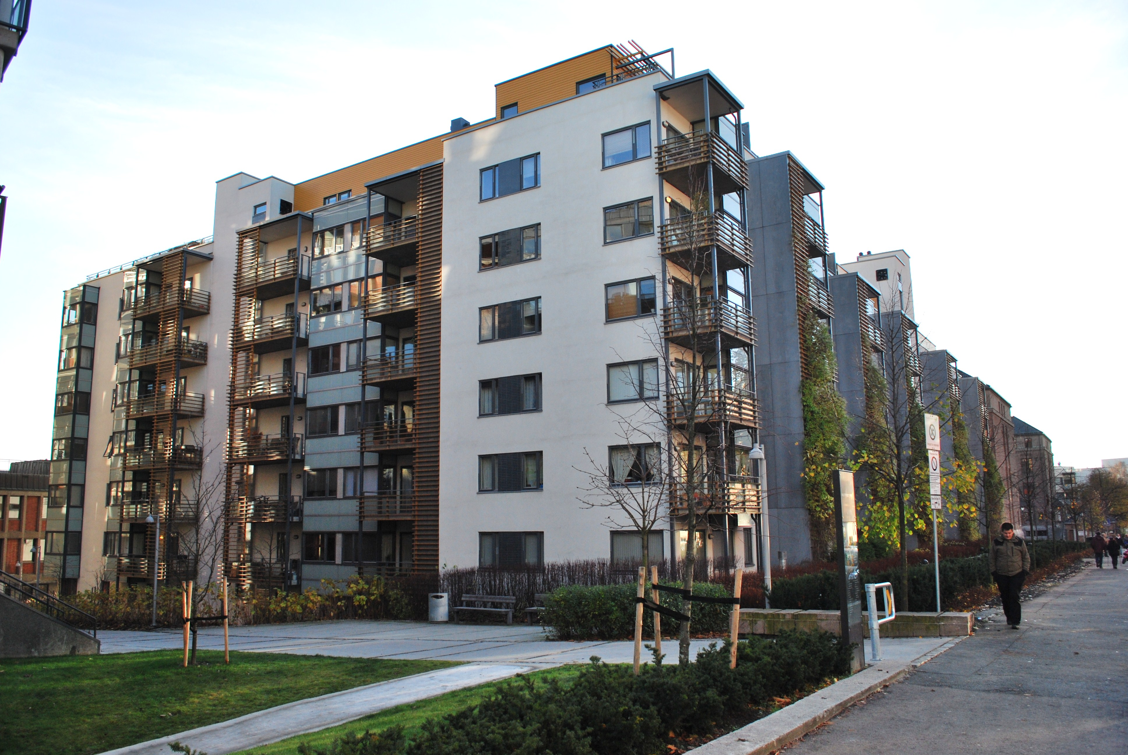 Nye boliger i Pilestredet park, Oslo, langs Stensberggata